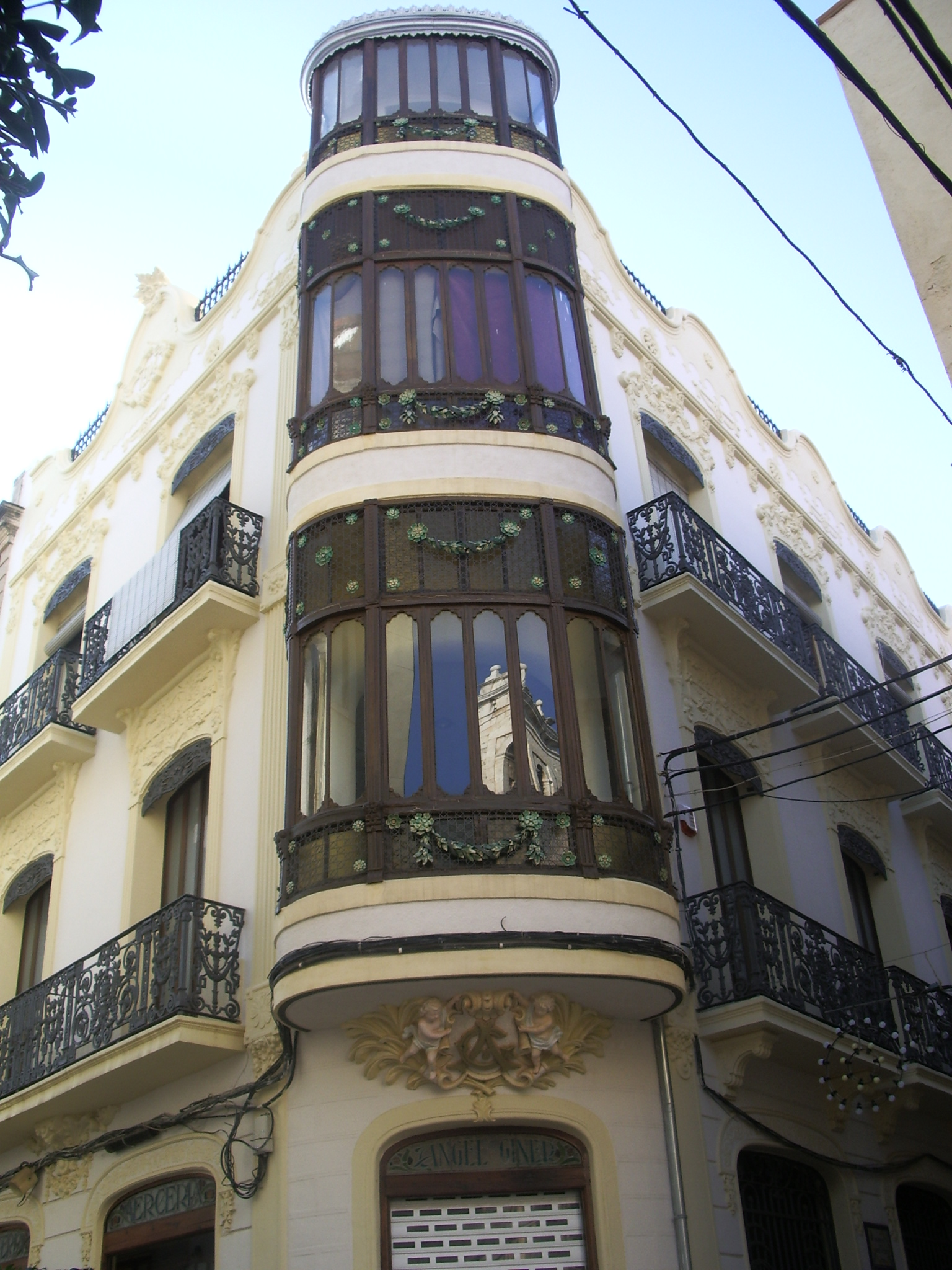 Casa Angel Giner, edifici moderniste situat en el carrer Major número 4 de Vinaròs (Castelló), 1914.